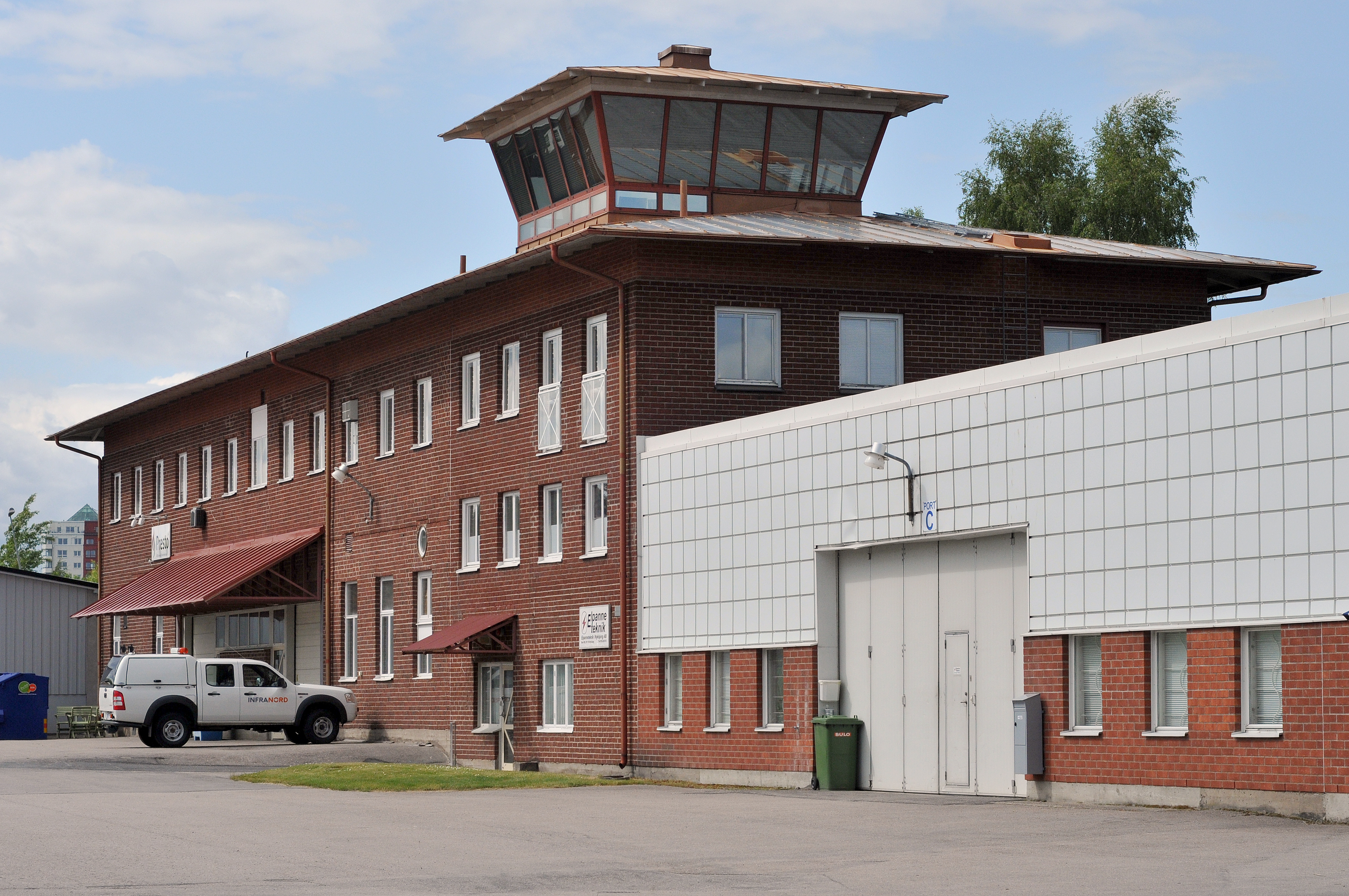 Brandholmen flygplats i Nyköpings kommun. Flygplatsen stängdes 1984 och delar av verksamheten flyttade till Skavsta flygplats.